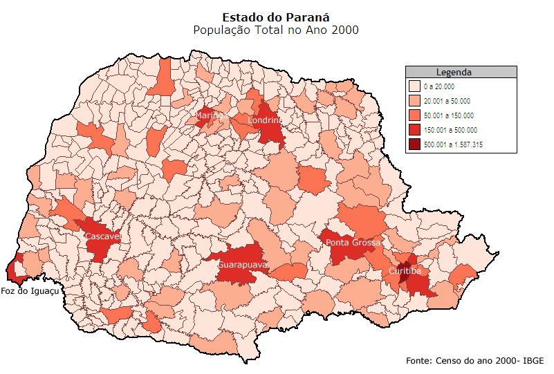 Distribuição geográfica da população do Paraná de acordo com o censo do IBGE do ano 2000